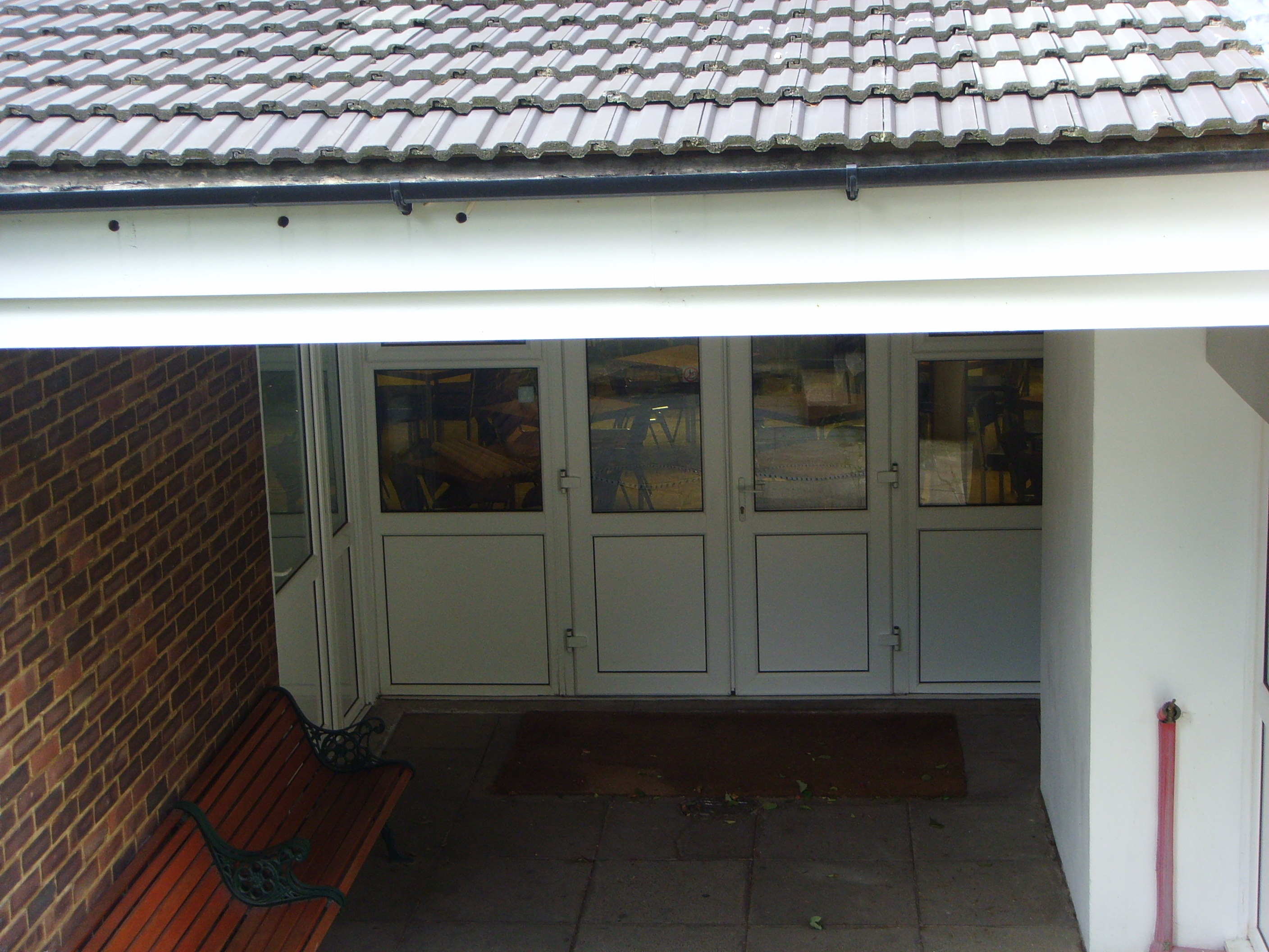 Kościół pod wezwaniem Andrzeja Boboli w Londynie